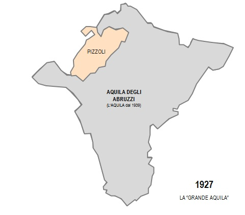 L'annessione dei comuni limitrofi al comune di Aquila degli Abruzzi per la creazione della "Grande Aquila"; Pizzoli conserverà buona parte del suo territorio ma perde la frazione di San Vittorino.